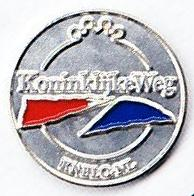 Speld Koninklijke Weg - KNBLO Jubileum wandelpad